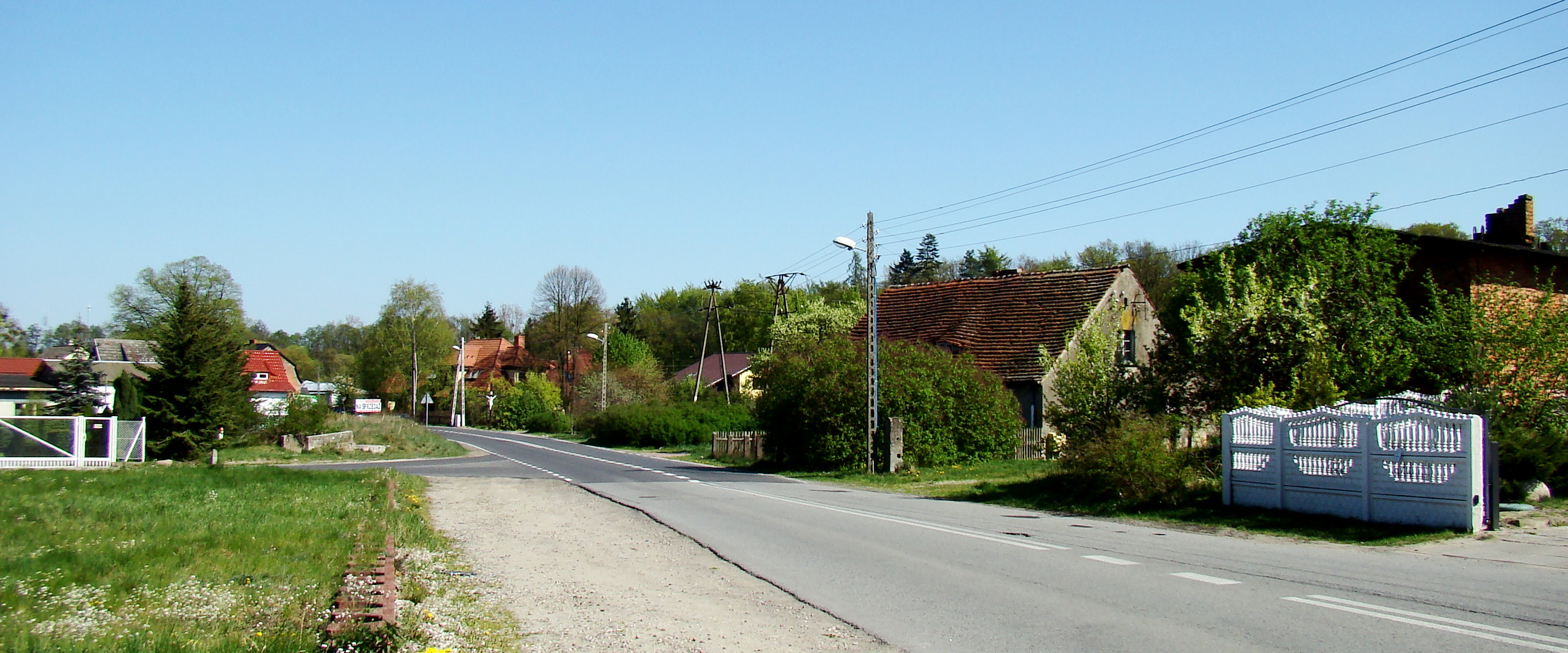 Siedlice, (Gmina Police, Powiat policki, Województwo zachodniopomorskie), Polska